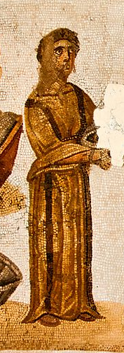 古代ローマの奴隷を描いたモザイク画